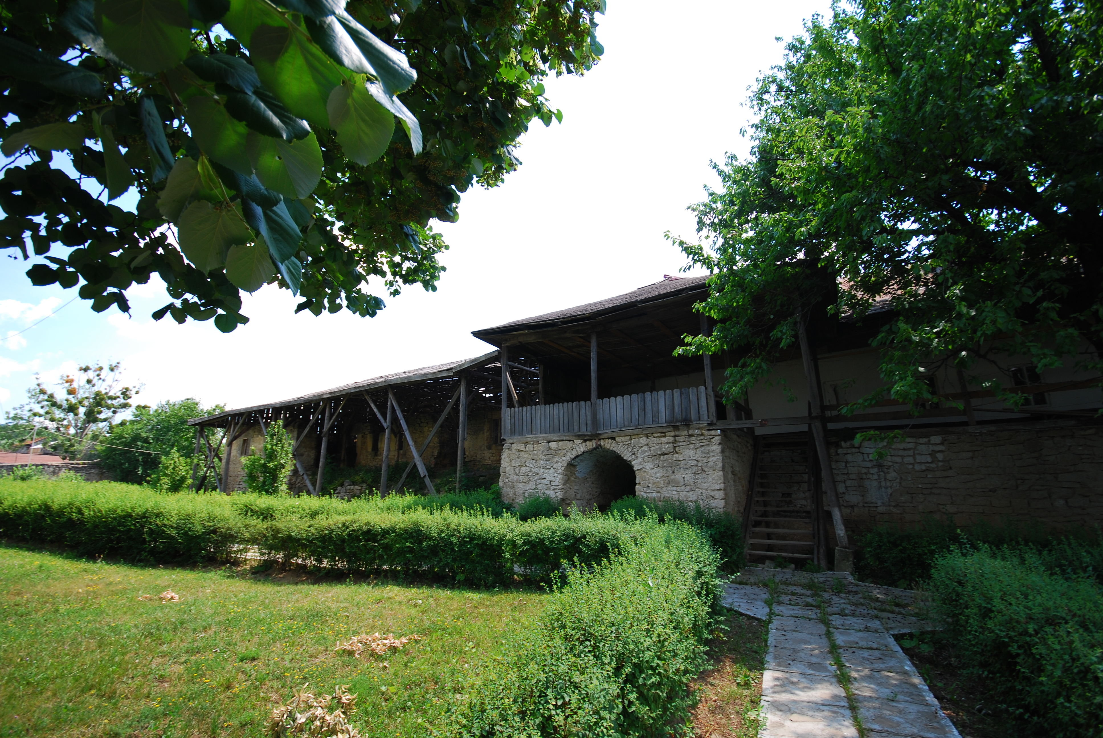 Ruine în incintă 02